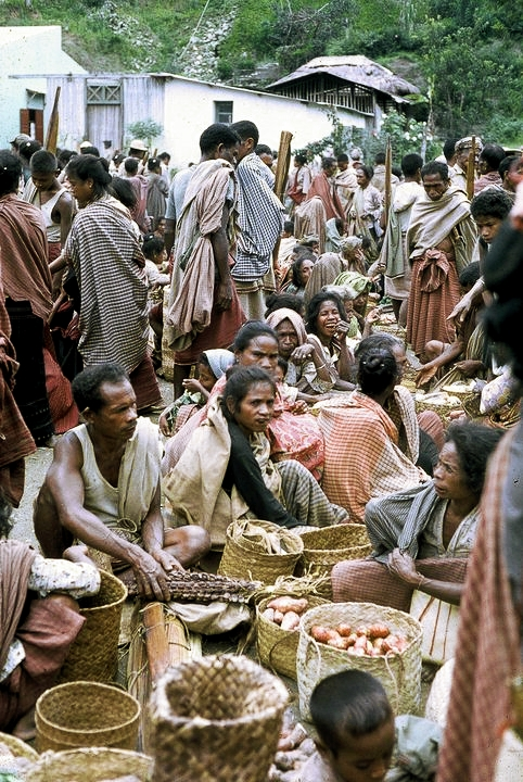 O convívio no bazar,onde se trocavam produtos e se mascava.A masca era uma mistura de folha de bétel,noz de areca e cal que produzia uma pasta avermelhada.Na boca ficava entalada no lábio.